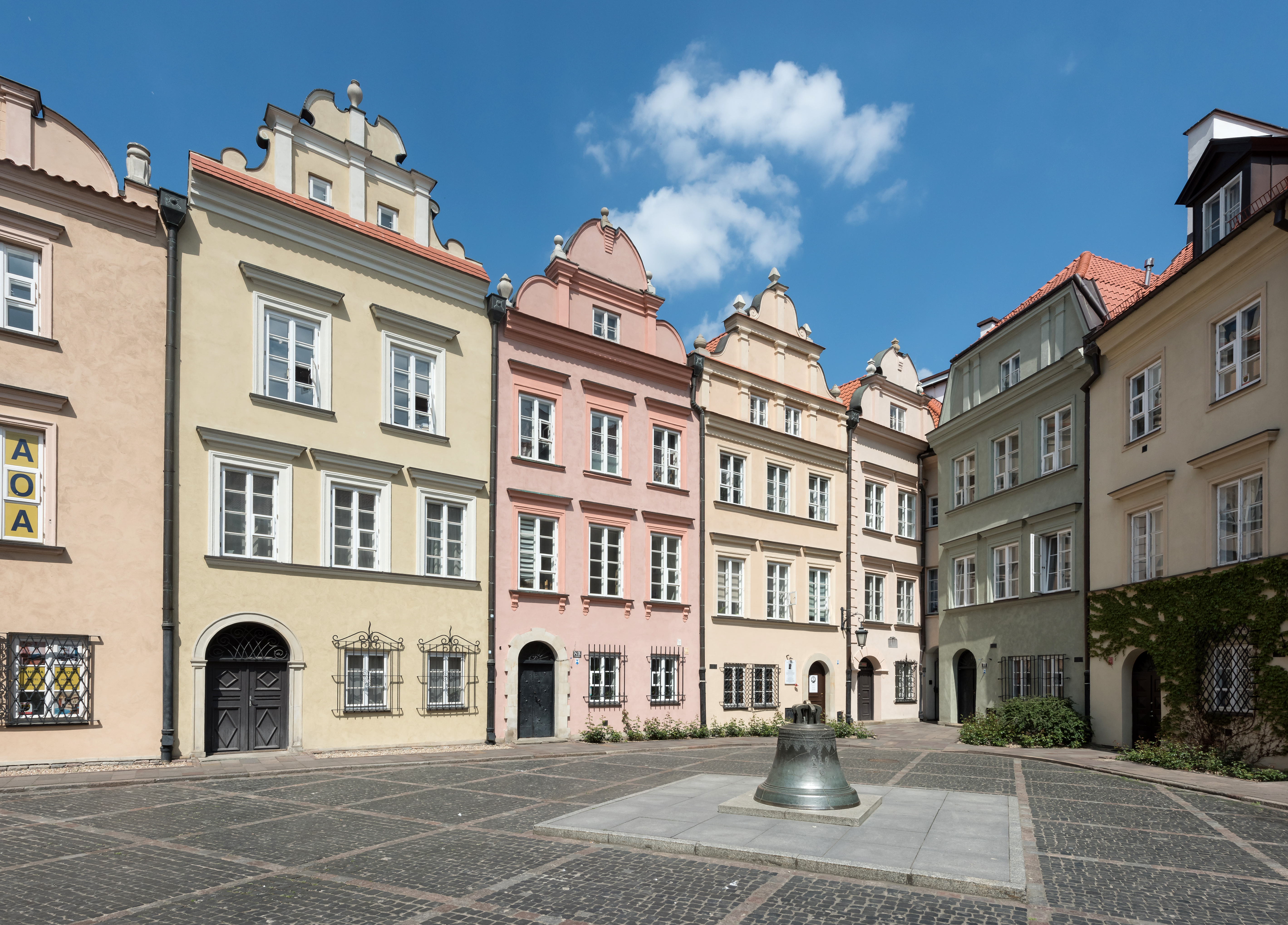 Ulica Kanonia w Warszawie